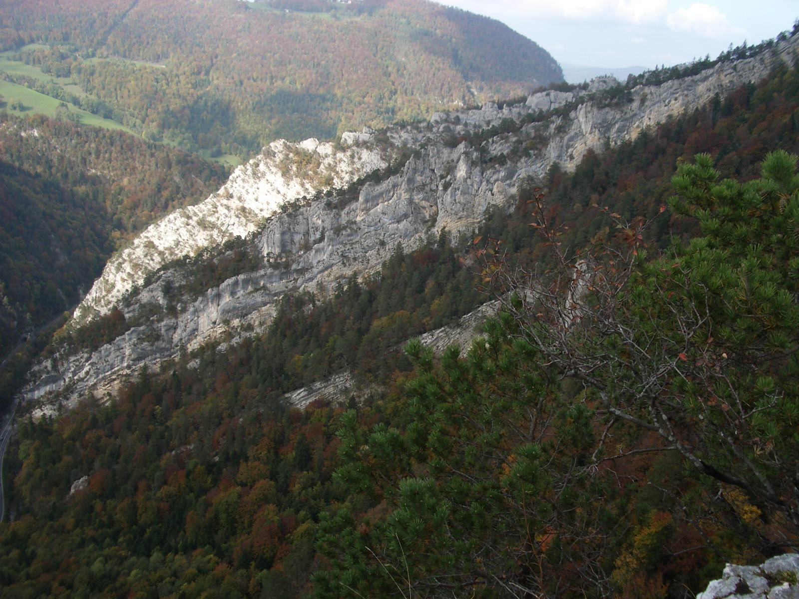 Mont Raimeux BE/JU, Switzerland